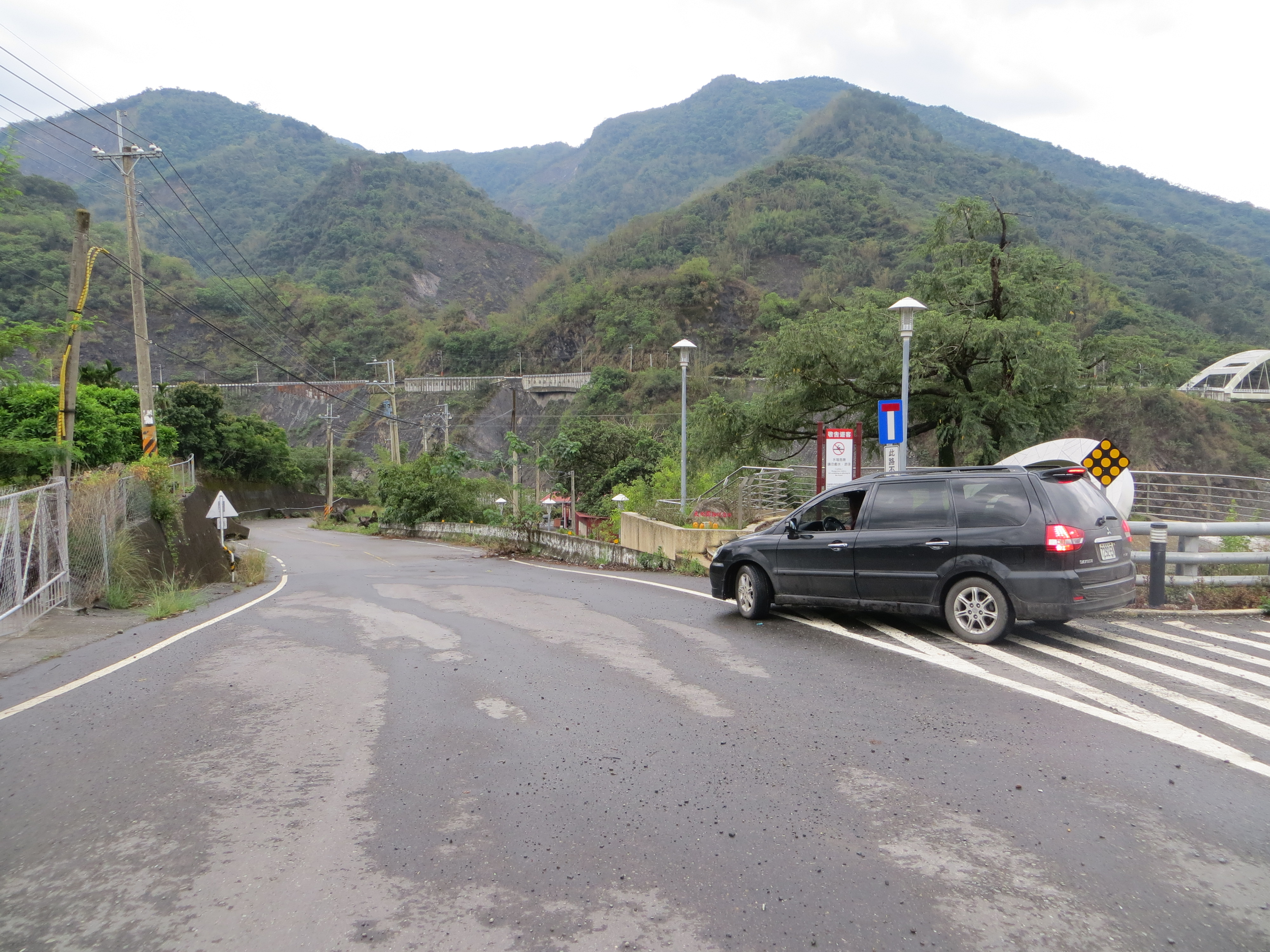 中文（台灣）: 台27線因八八風災後，新發大橋改道重建而棄用的舊道。